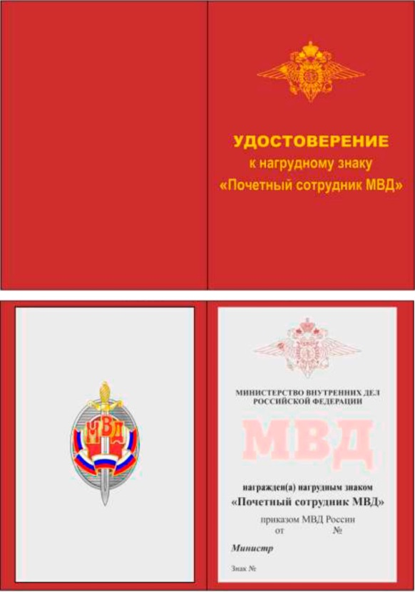 Удостоверение к нагрудному знаку «Почётный сотрудник МВД», лицевая сторона и внутренняя сторона.